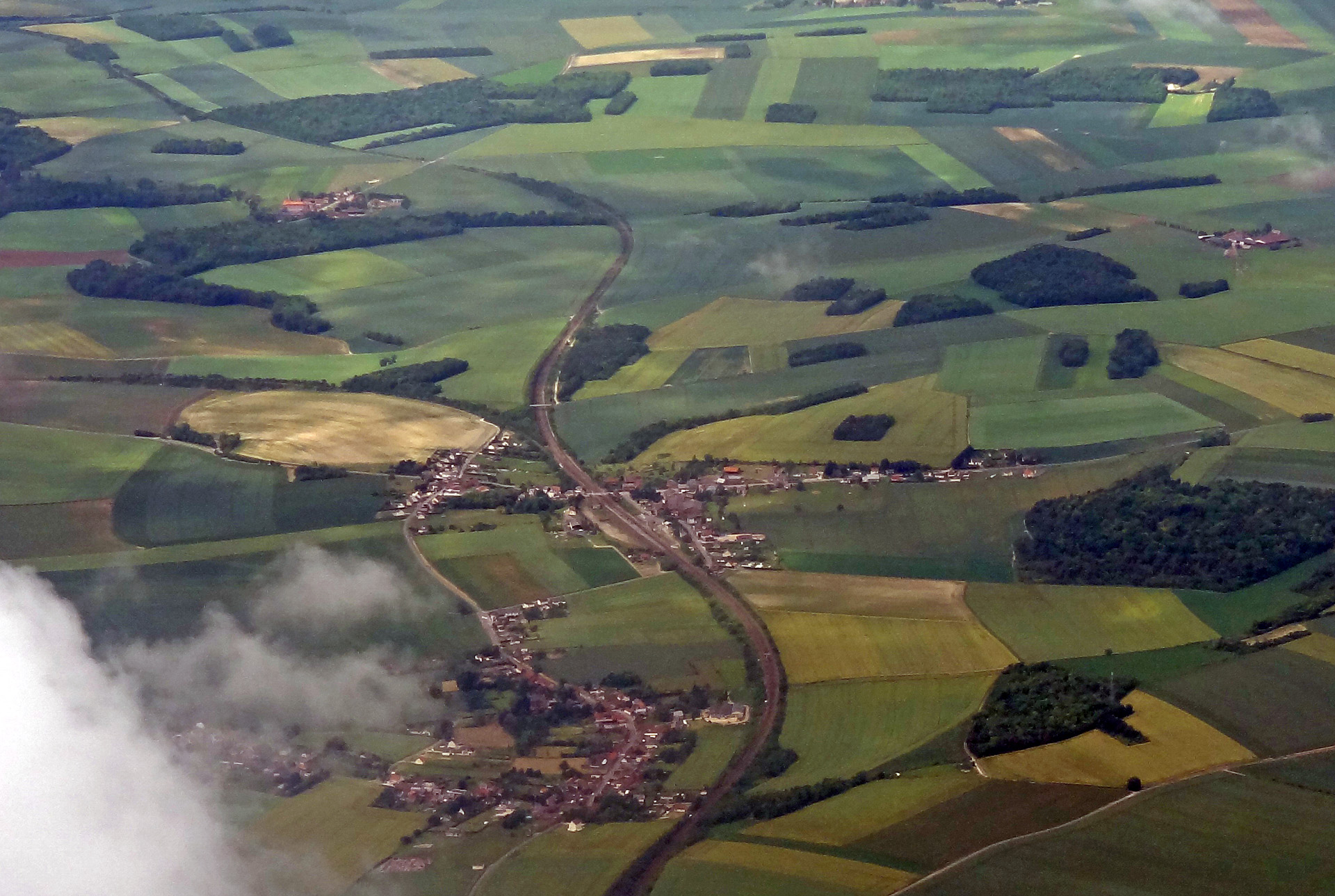 Vue aérienne de Bacouël et de la gare de Breteuil-Embranchement (Oise), France.